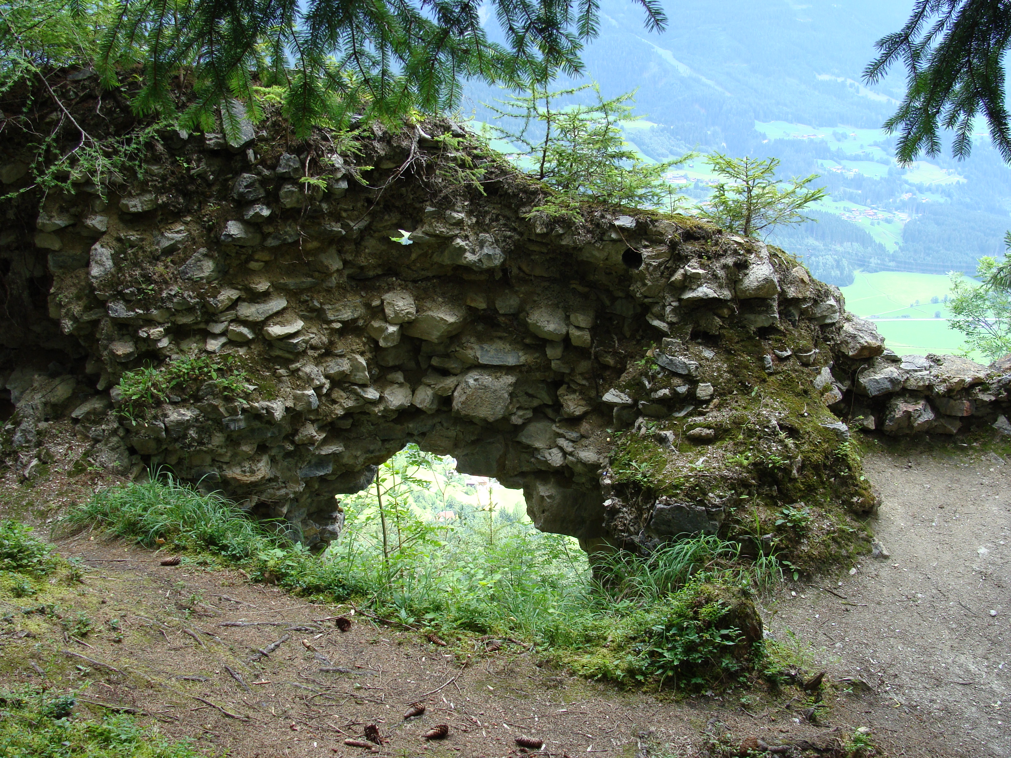 Burgruine Friedburg bei Sulzau innerhalb der Gemeinde Neukirchen am Großvenediger